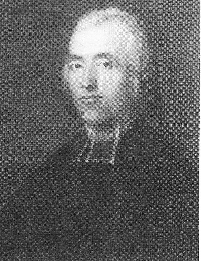 Georg Joachim Zollikofer. Porträit im Auftrag von Philipp Erasmus Reich, Besitz der Universität Leipzig